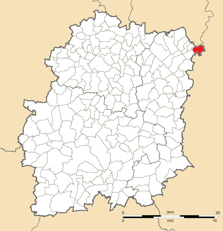 Carte de position de Varennes-Jarcy en Essonne (91)